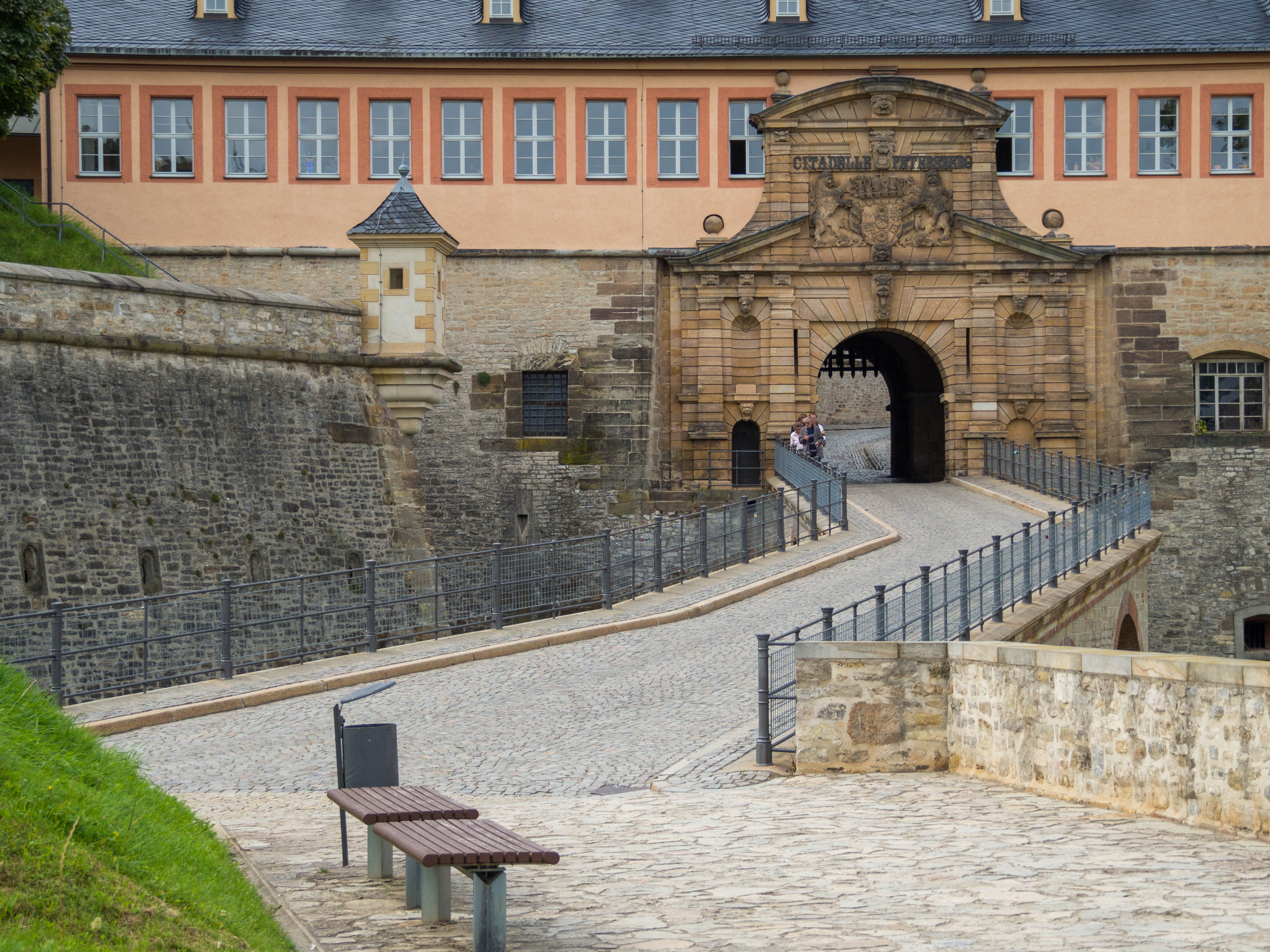 WLM-Fototour Erfurt 2014 Dieses Foto wurde im Rahmen der WLM-Fototour 2014 in Erfurt erstellt, die vom 29. bis 31. August 2014 zum Auftakt des Wettbewerbs Wiki Loves Monuments 2014 statt fand. The making of this document was supported by the Community-Budget of Wikimedia Germany. Zitadelle Petersberg in Erfurt